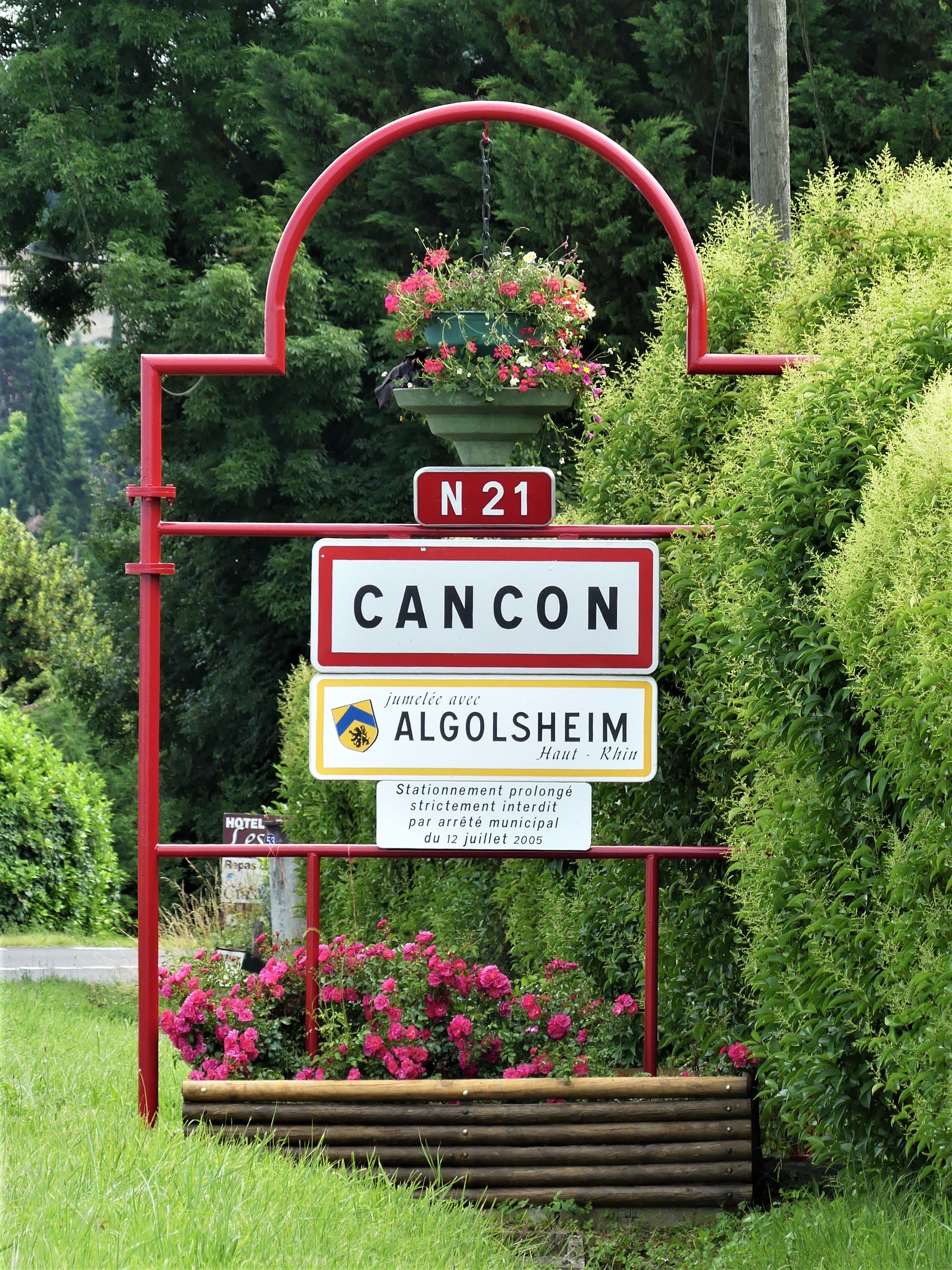 Panneau de jumelage sur la route nationale 21, Cancon, Lot-et-Garonne-France.